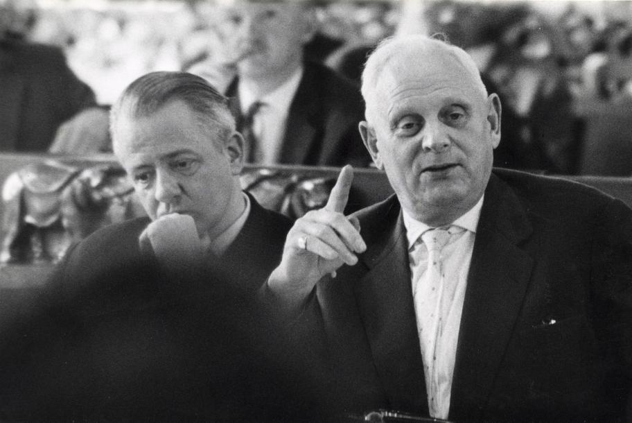 De voorzitter van de CPN-fractie in de gemeenteraad van Amsterdam, de heer Seegers, tijdens een zitting over de IJ-tunnel. Amsterdam, Nederland, 20 juli 1960.